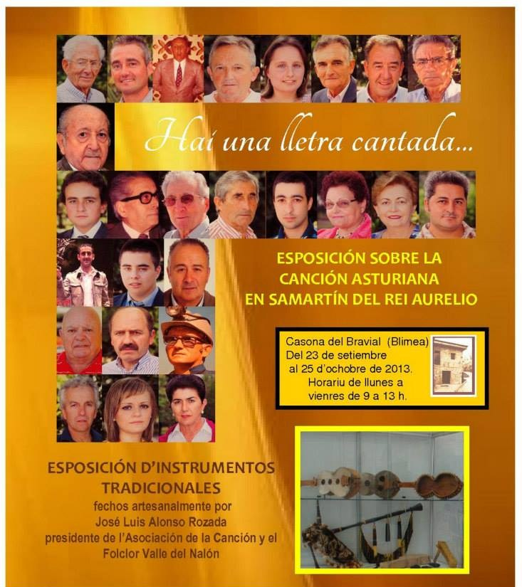 Esposición sobre la canción asturiana en Samartín